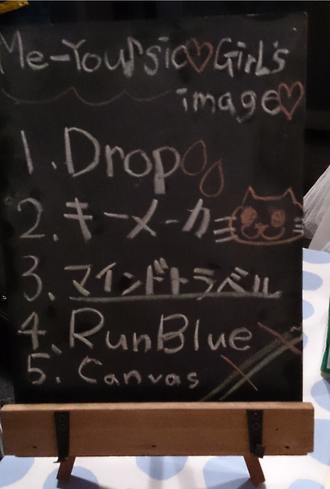 amiinaセトリボード(20150201(1))